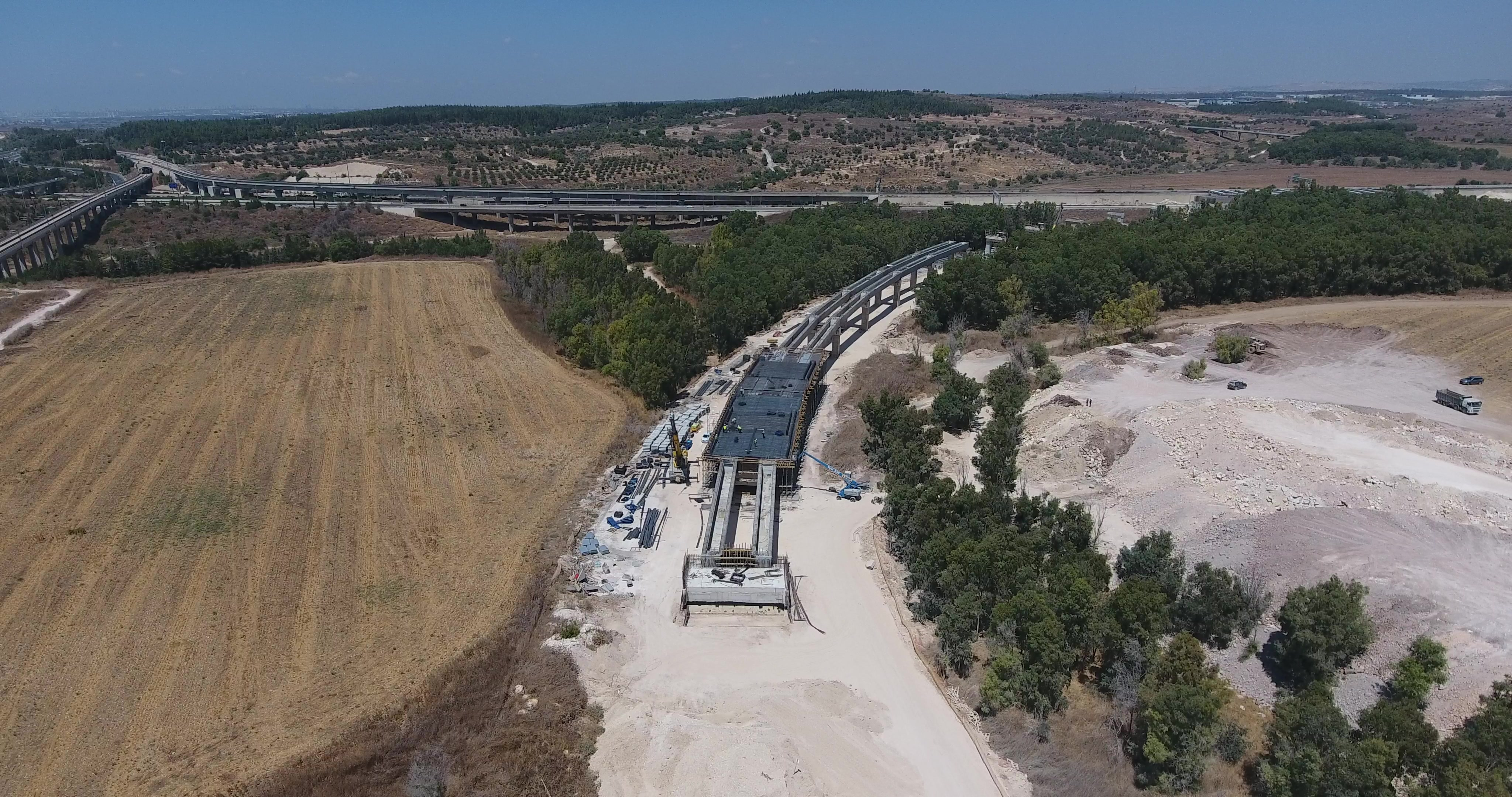 קשת מסילתית המחברת את המסילה המגיעה מקו הרכבת לירושלים אל שלוחת הרכבת למודיעין בסמוך למחלף ענבה. ברקע נראה כביש 431 שמסילת הרכבת למודיעין עוברת בין נתיביו, מחלף ענבה והמסילה הממשיכה לכיוון תל אביב